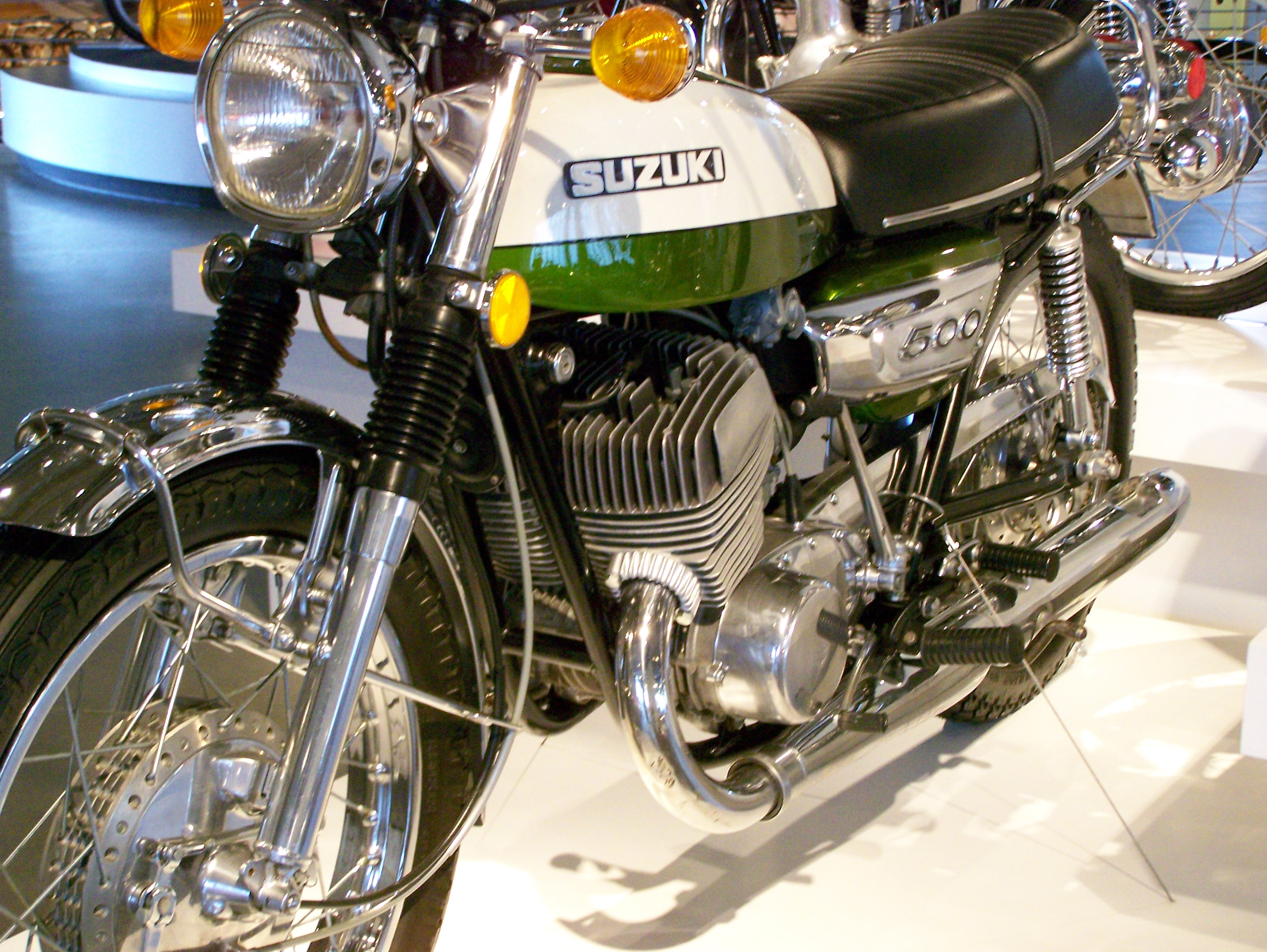 Barber Vintage Museum_226 Suzuki T500